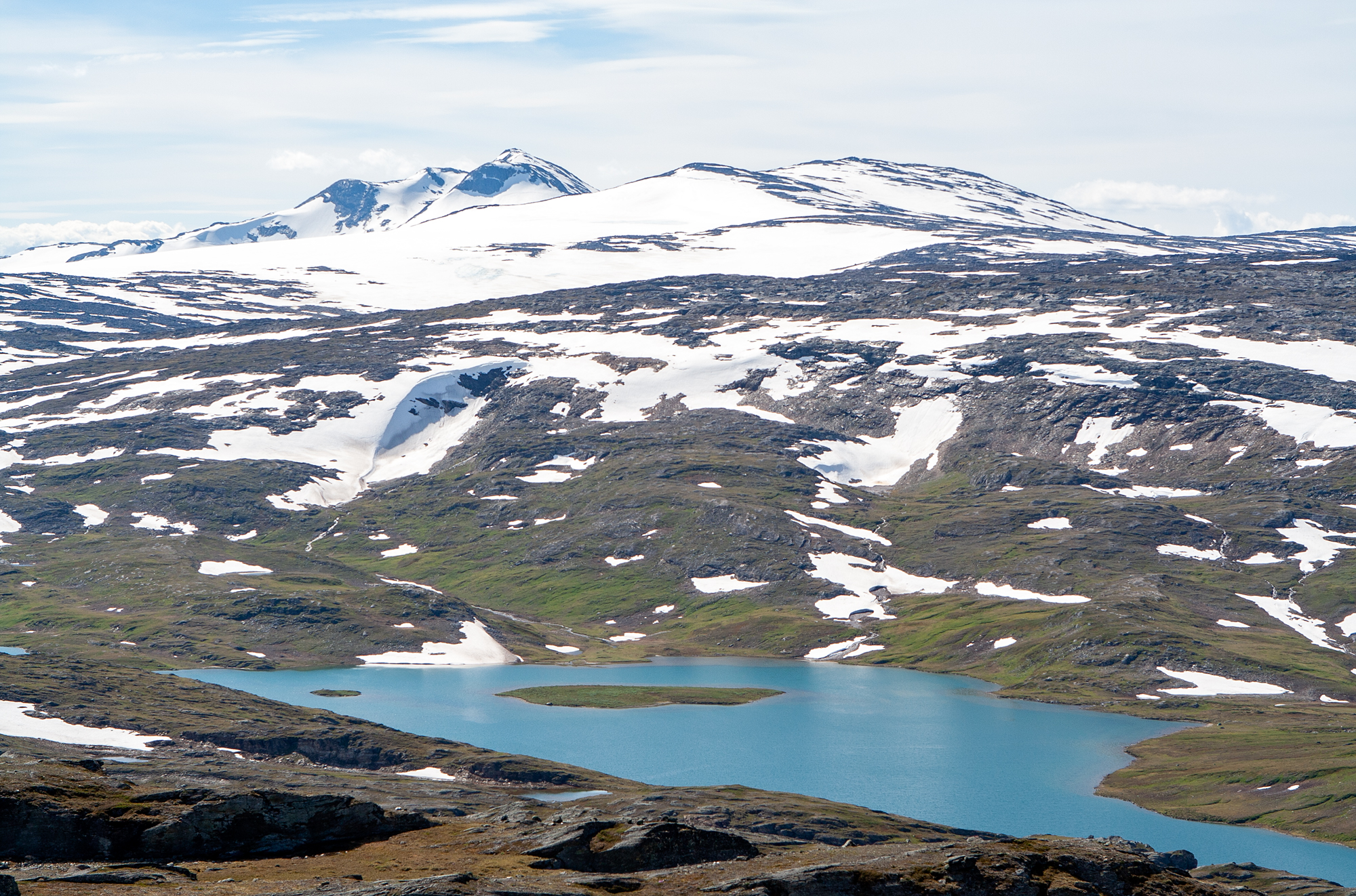 Vy från Goabrek mot sjö 746897-152982 i sydväst. I bakgrunden Ålmåjjiegŋa och 1663.